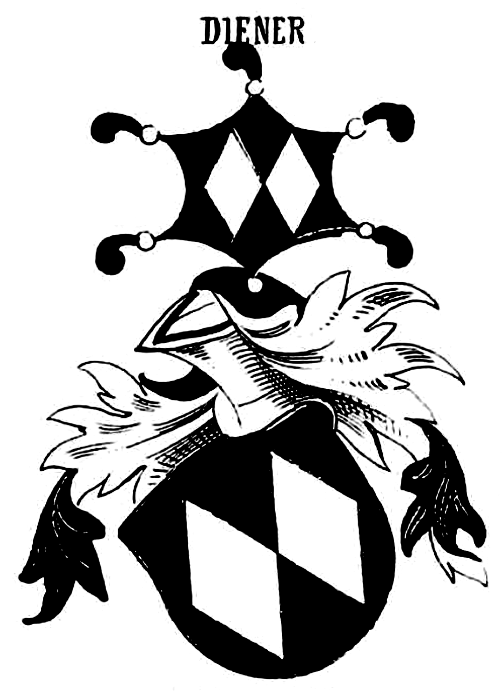 Wappen der Münchner ritterbürtigen Patrizierfamilie Diener